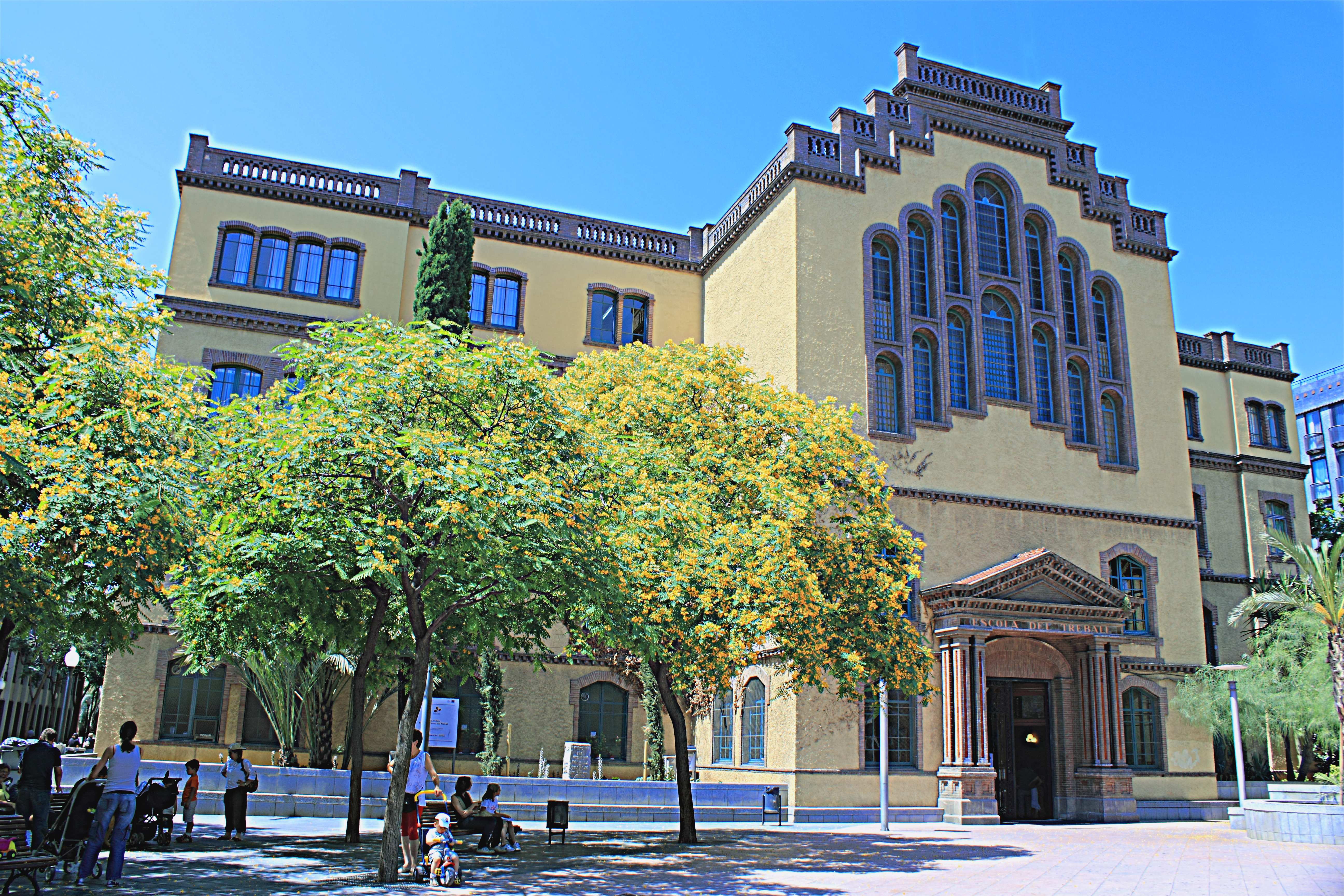 Conjunt del recinte de l'Escola Industrial (Barcelona)